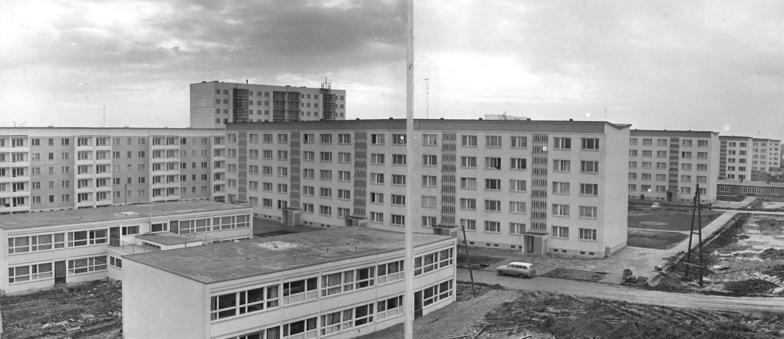 Halle, Halle-West, Neubaugebiet, Wohnblocks Zentralbild Schaar 2.3.1966 In der Chemiearbeiterstadt Halle-West gehen die Arbeiten zügig voran. 2055 Wohnungseinheiten sollen in diesem Jahr an die neuen Mieter übergeben werden. Ein zweiter "Pittiplatsch"-Kindergarten (links im Vordergrund) wurde im Februar an die Kleinsten Einwohner der neuen Stadt übergeben.